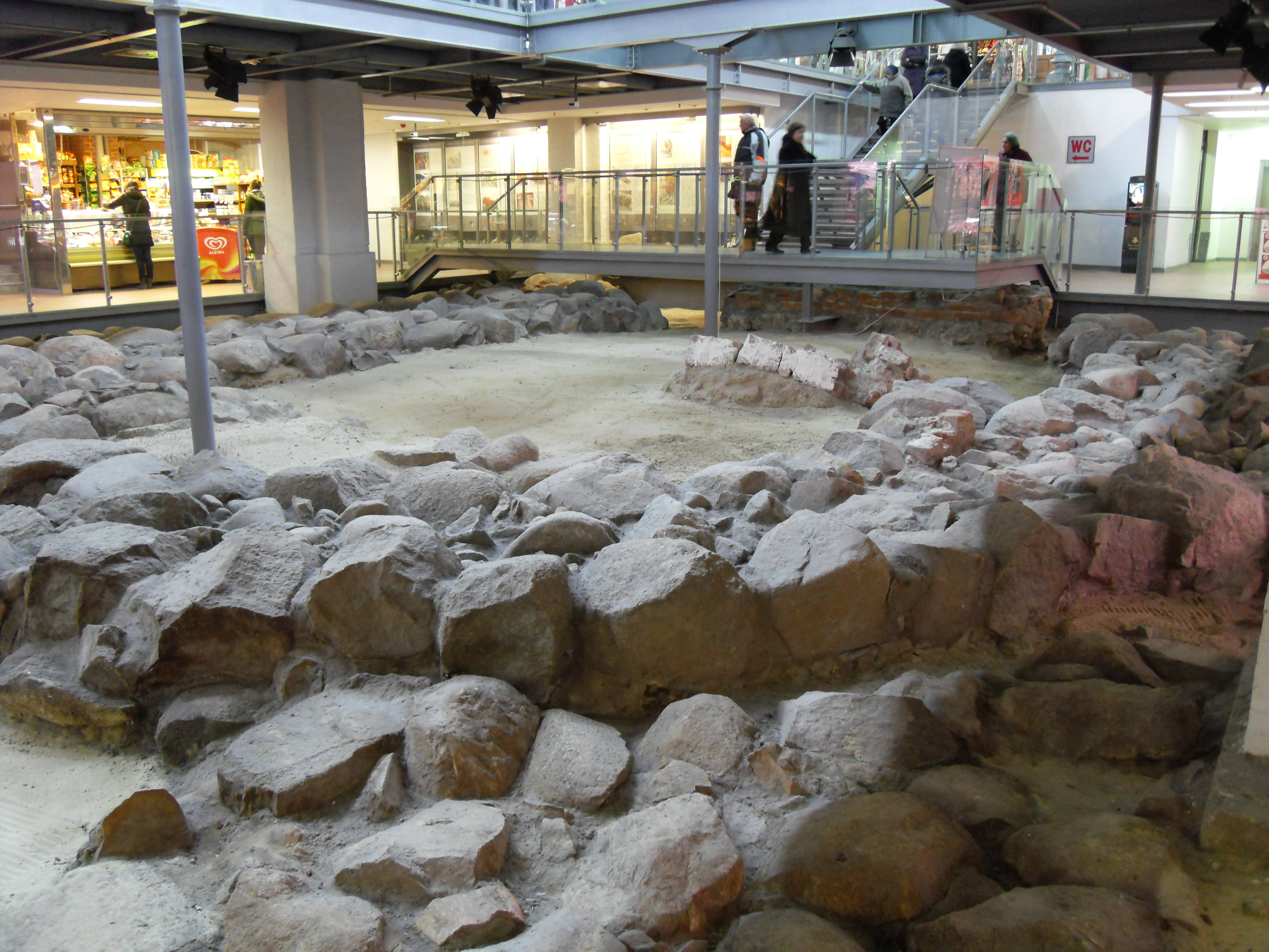 Podziemia Hali Targowej w Gdańsku.